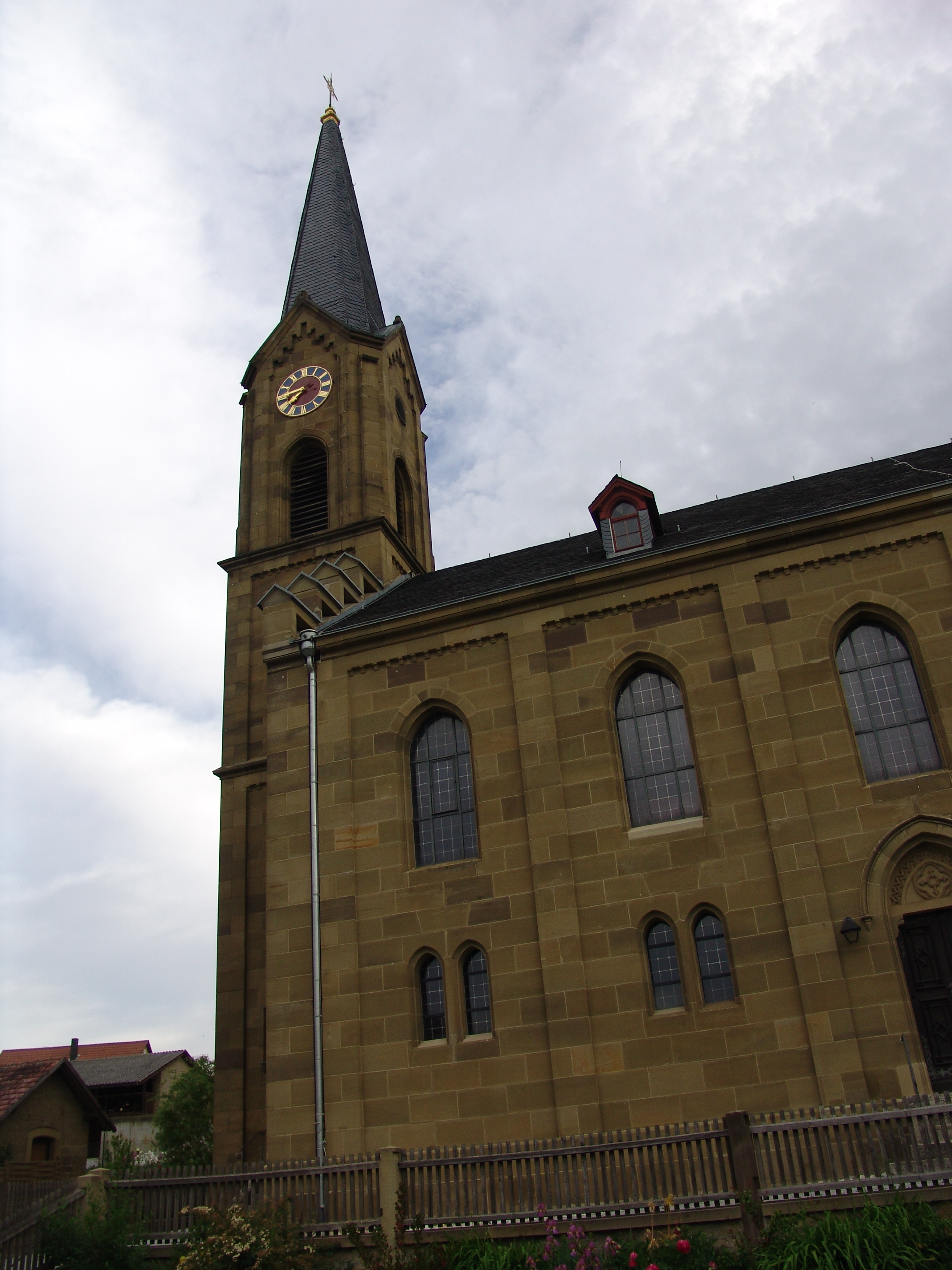 evang.-luth Kirche in Enheim